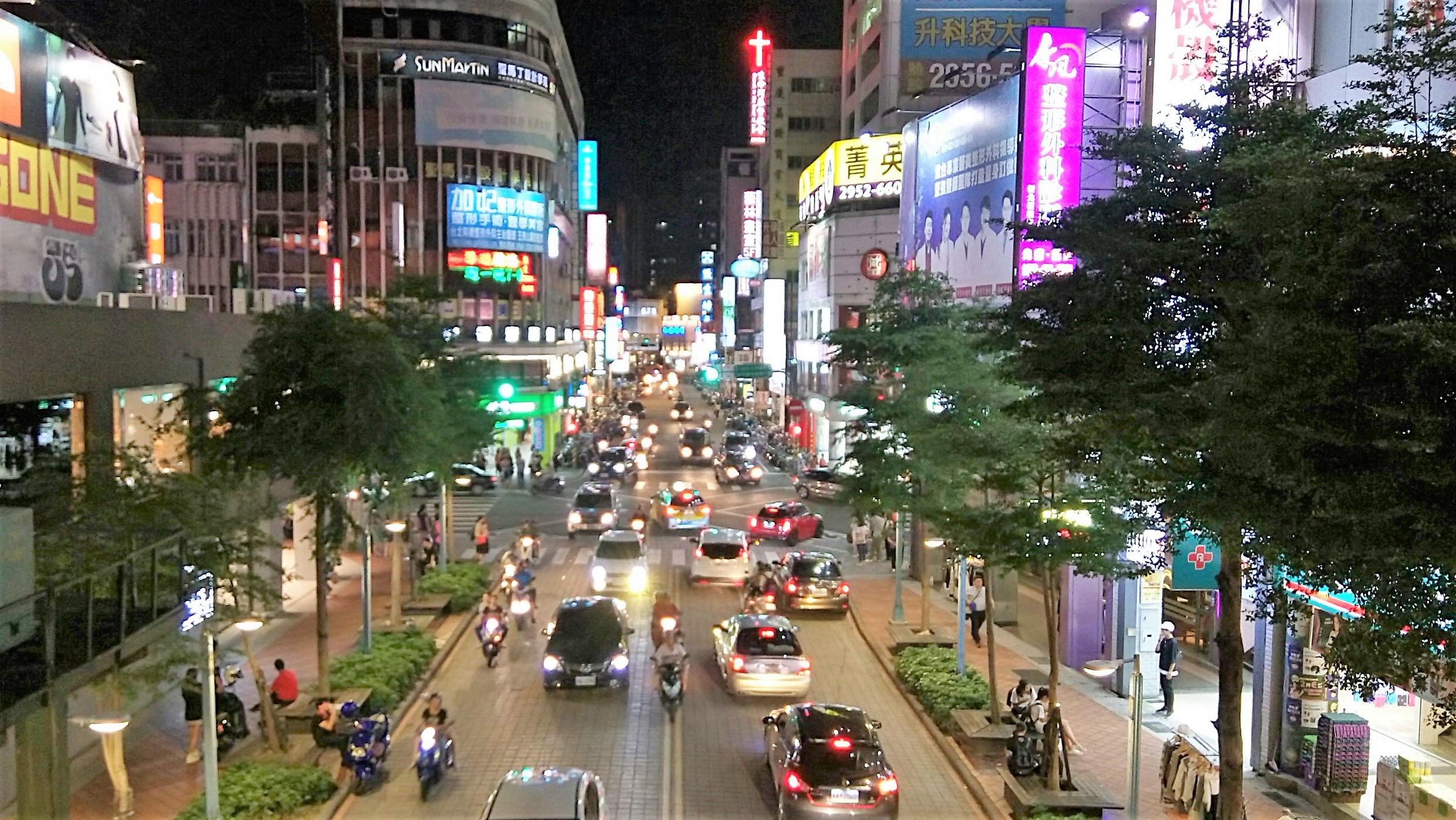 府中商圈有新北西門町的稱號